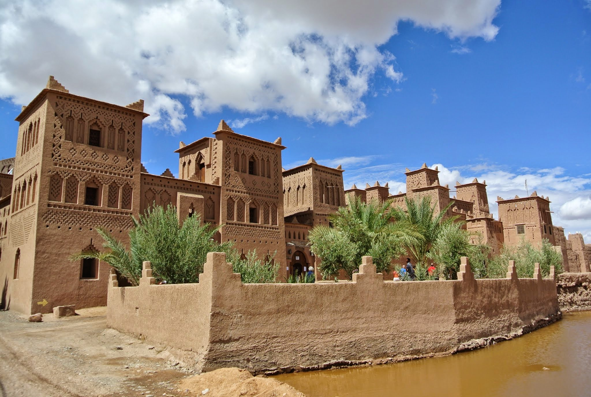 Ouarzazate Province, Morocco